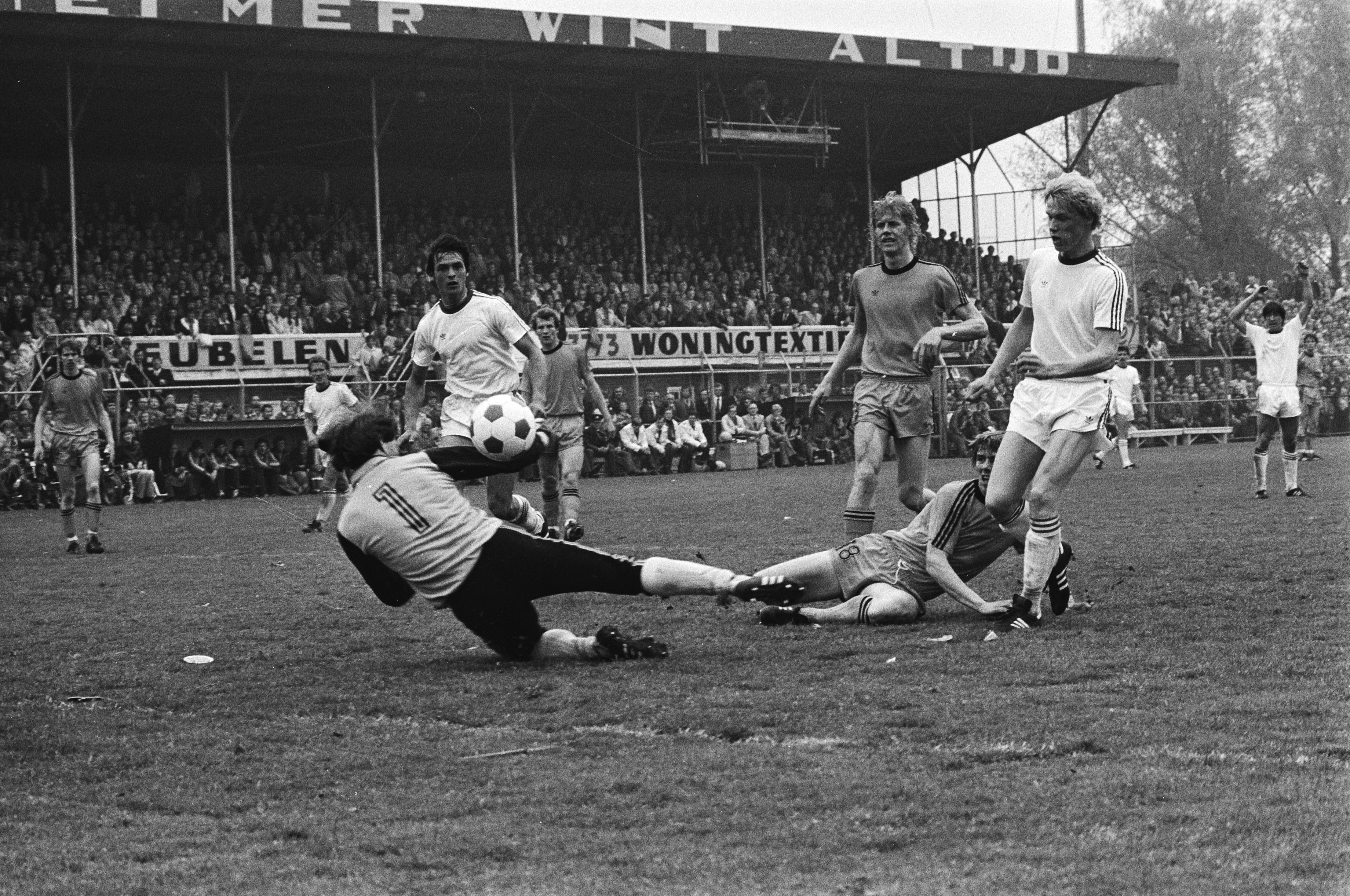 Collectie / Archief : Fotocollectie Anefo Reportage / Serie : Volendam tegen Feijenoord 0-2 Beschrijving : Petersson (rechts) scoort het 1e doelpunt , v.l.n.r. Hoek, Peters, Guyt, Molenaar en Petursson Datum : 20 mei 1979 Locatie : Noord-Holland, Volendam Trefwoorden : sport, voetbal Persoonsnaam : Guyt, Kees, Hoek, Frans, Molenaar, Keje, Peters, Jan, Petursson, Petur Instellingsnaam : Feyenoord Fotograaf : Suyk, Koen / Anefo Auteursrechthebbende : Nationaal Archief Materiaalsoort : Negatief (zwart/wit) Nummer archiefinventaris : bekijk toegang 2.24.01.05 Bestanddeelnummer : 930-2757